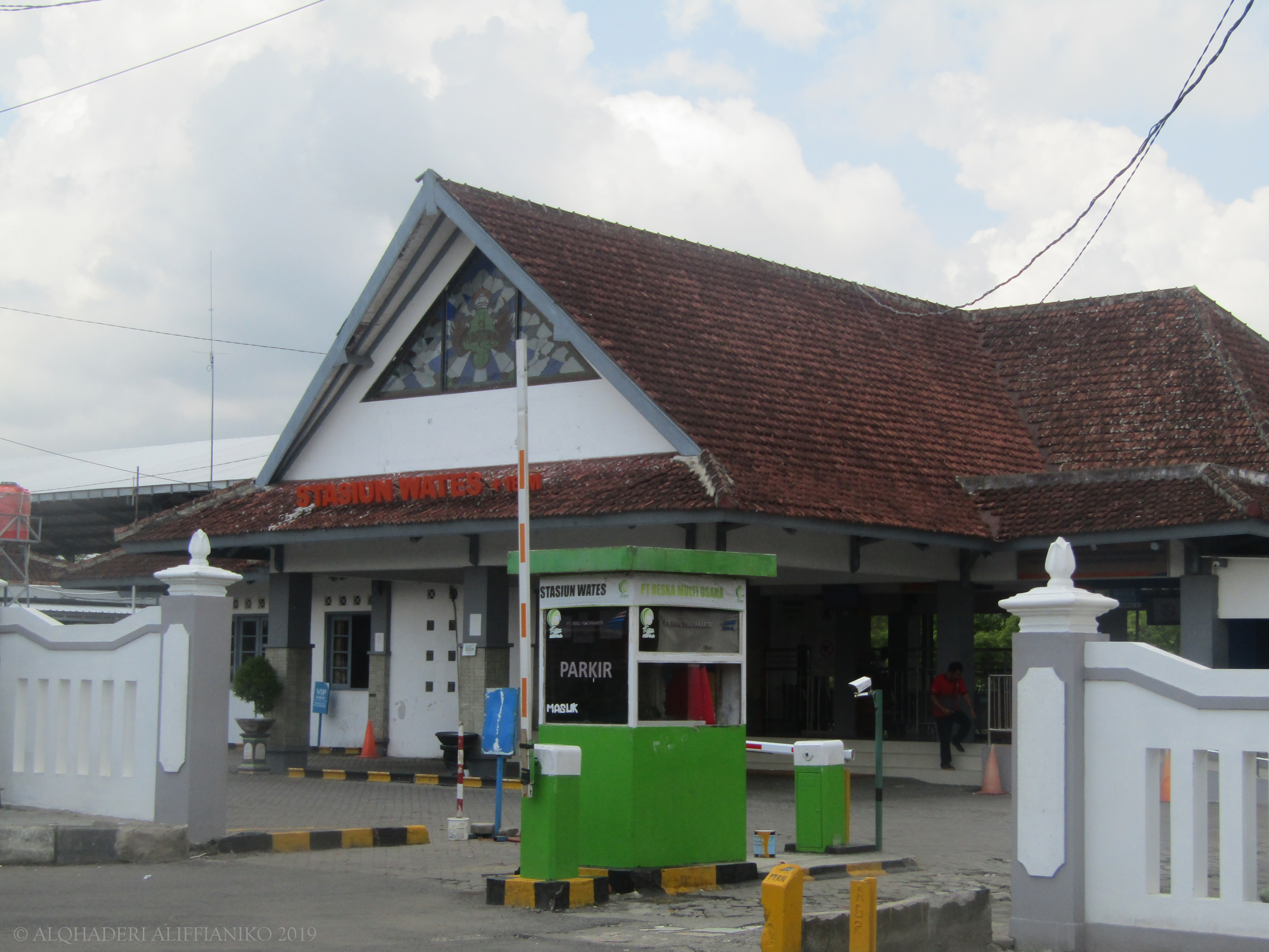 Bangunan utama Stasiun Wates, 2019